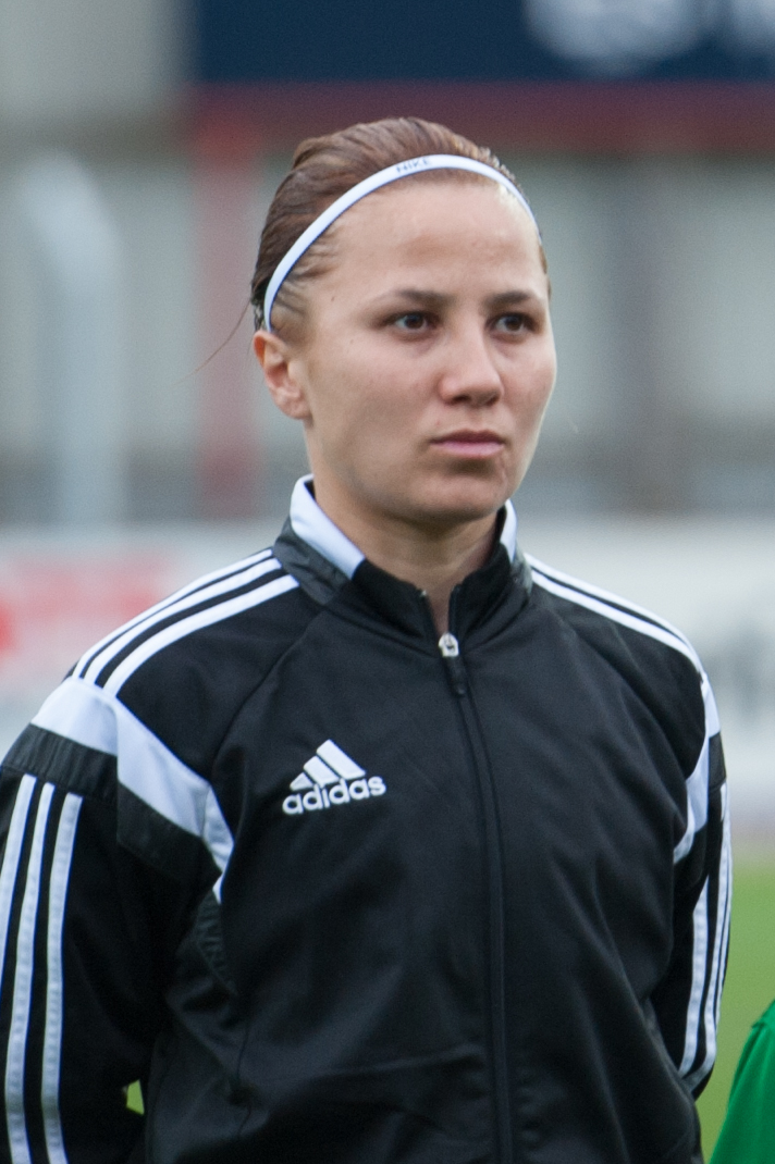 Steyr, Austria, 06.04.2016, ÖFB Frauen EM-Qualifikation - Österreich vs Kasachstan. Bild zeigt Saule Karibaeva (KAZ).